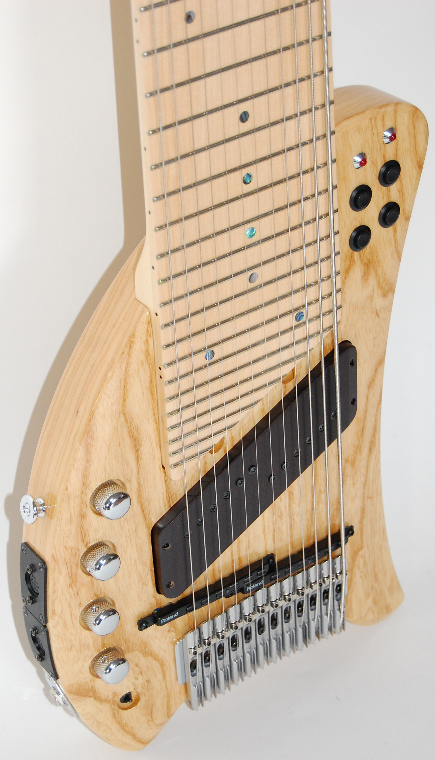 12 saitige japanische Tap-Gitarre KOYABU STD mit Roland GK Synthesizer-Tonabnehmern